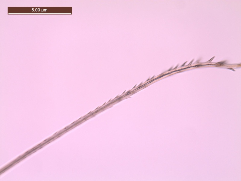 Grammostola sp. North poil urticant